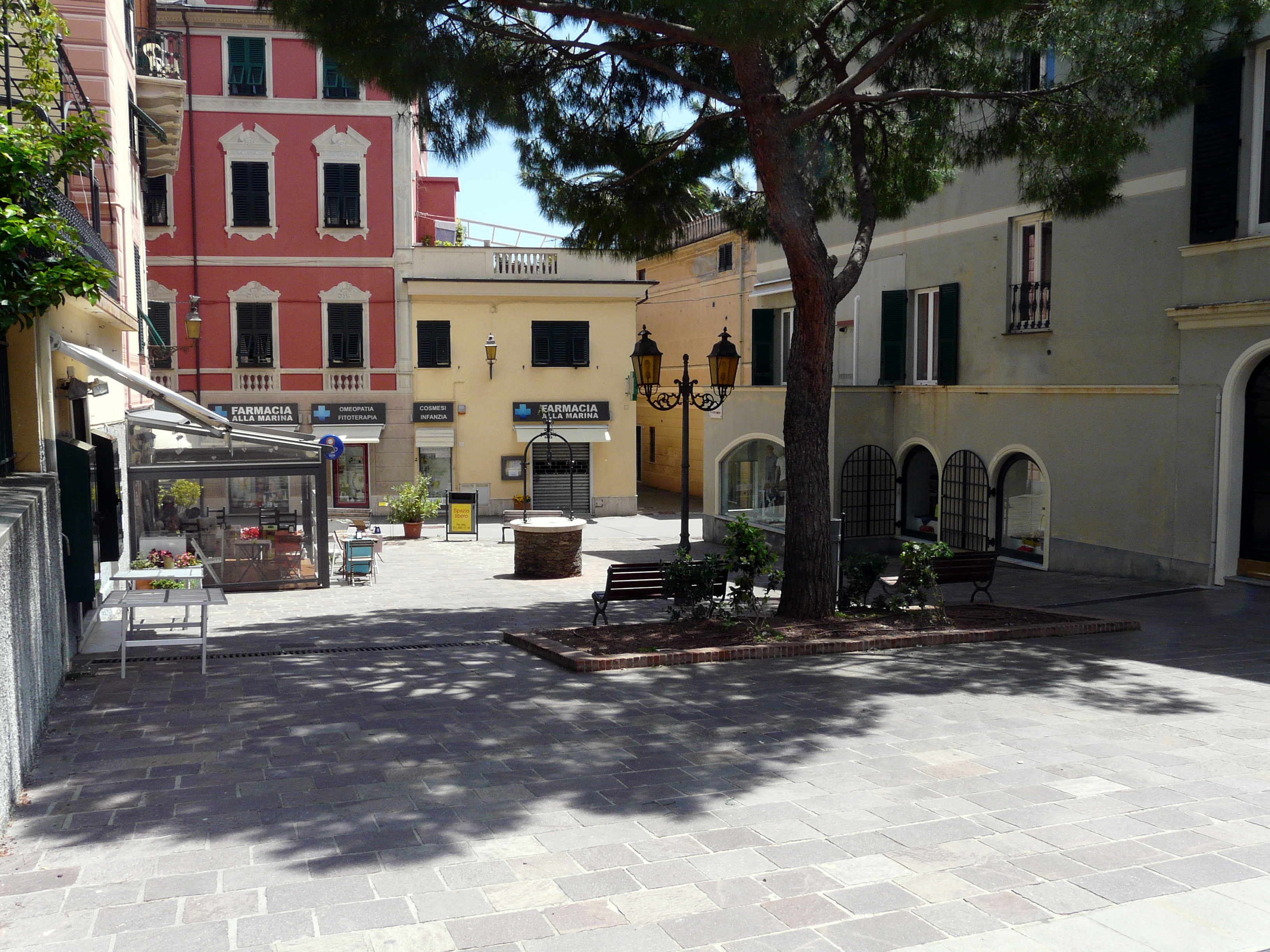 Centro storico di Arenzano, Liguria, Italia